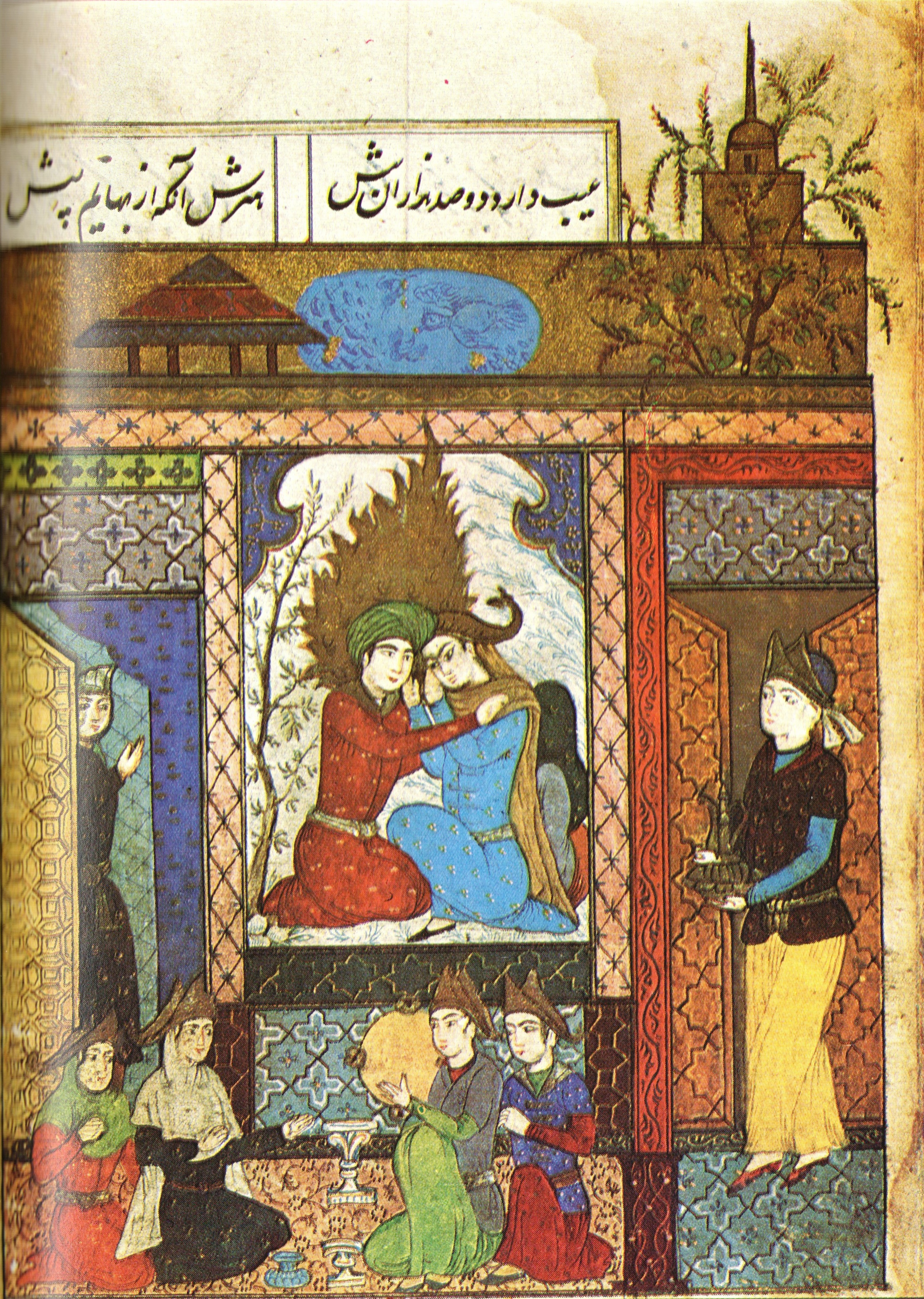 Санаи - Хадигат ул-хакаик.